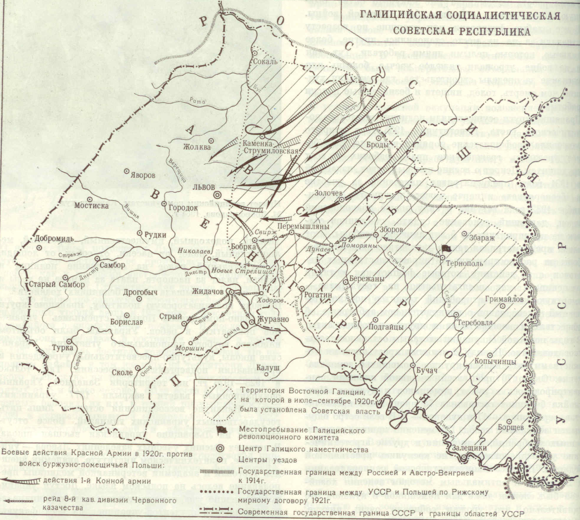 Скан иллюстрации из книги "История городов и сел УССР" Львовская область.Главная редакция украинской советской энциклопедии. К.1978